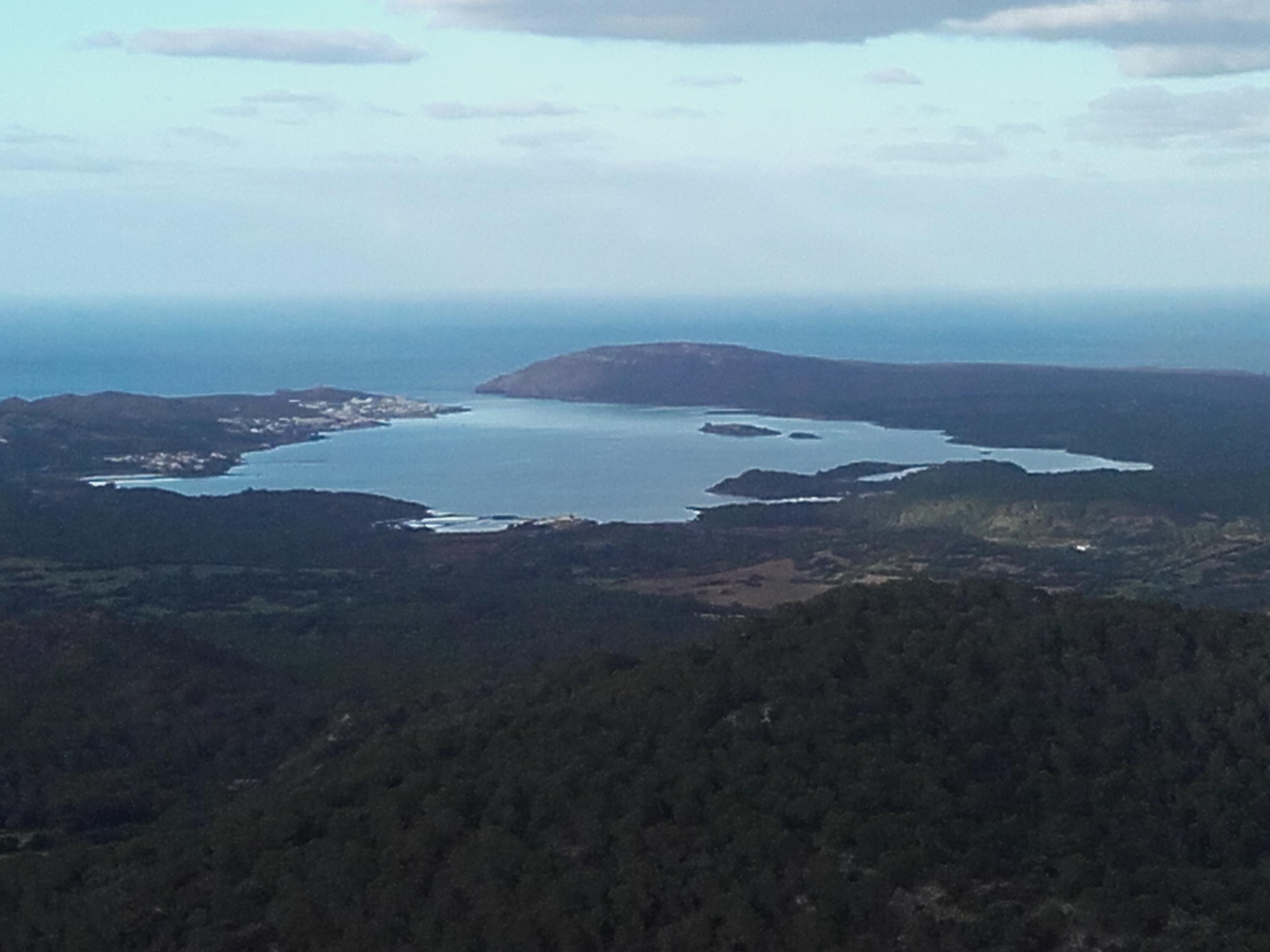 Bahía en Menorca, Islas Baleares, (España)